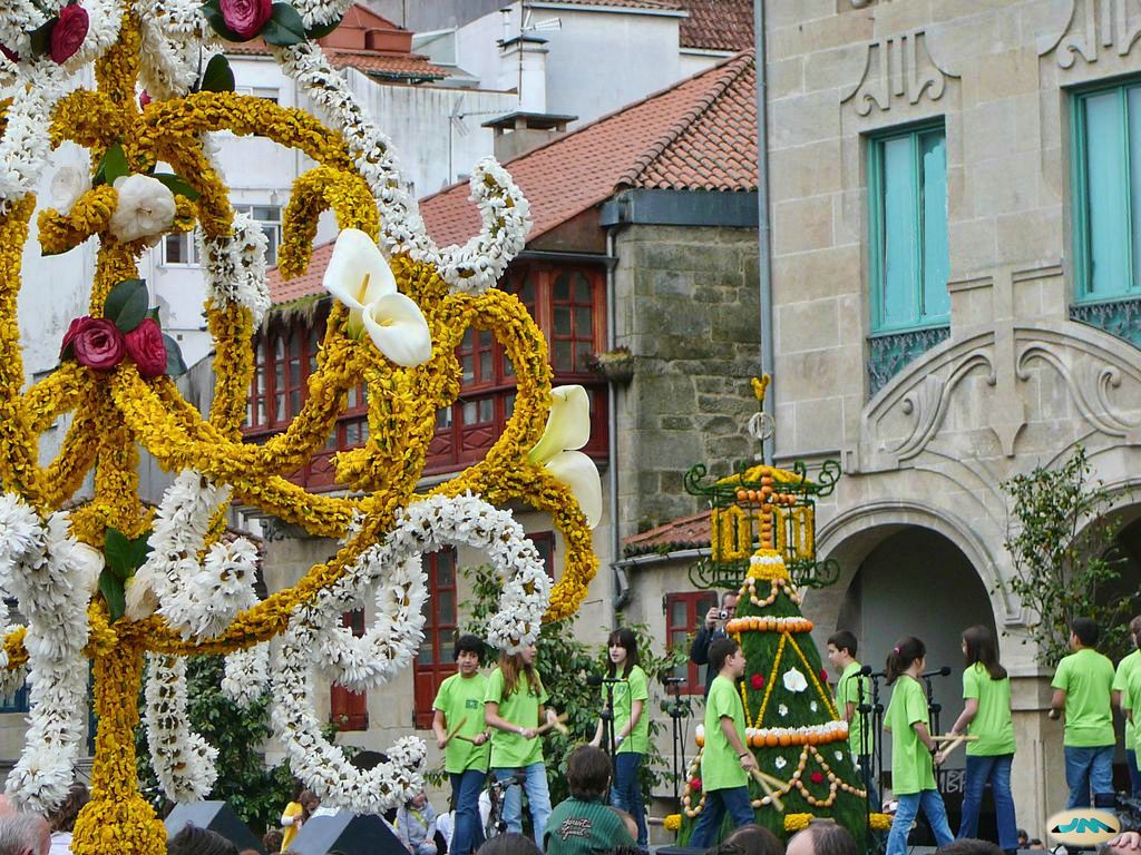 Pontevedra - Festa dos maios